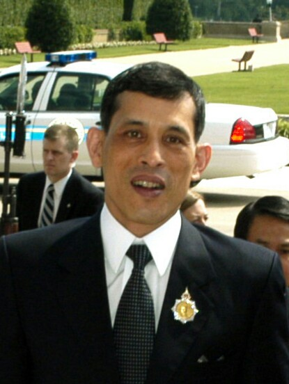 Vajiralongkorn